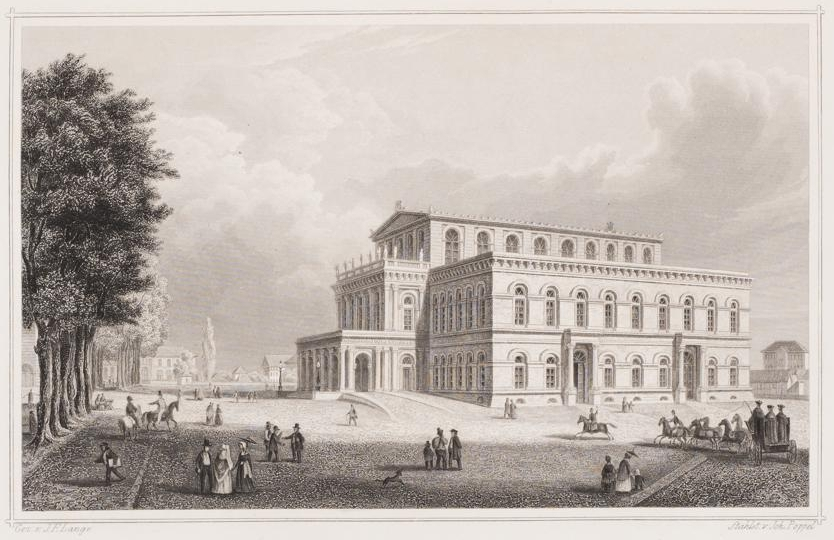 Das Neue Hoftheater zu Hannover, Stahlstich 1858